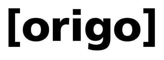 Az Origo hírportál egy korábbi logója.